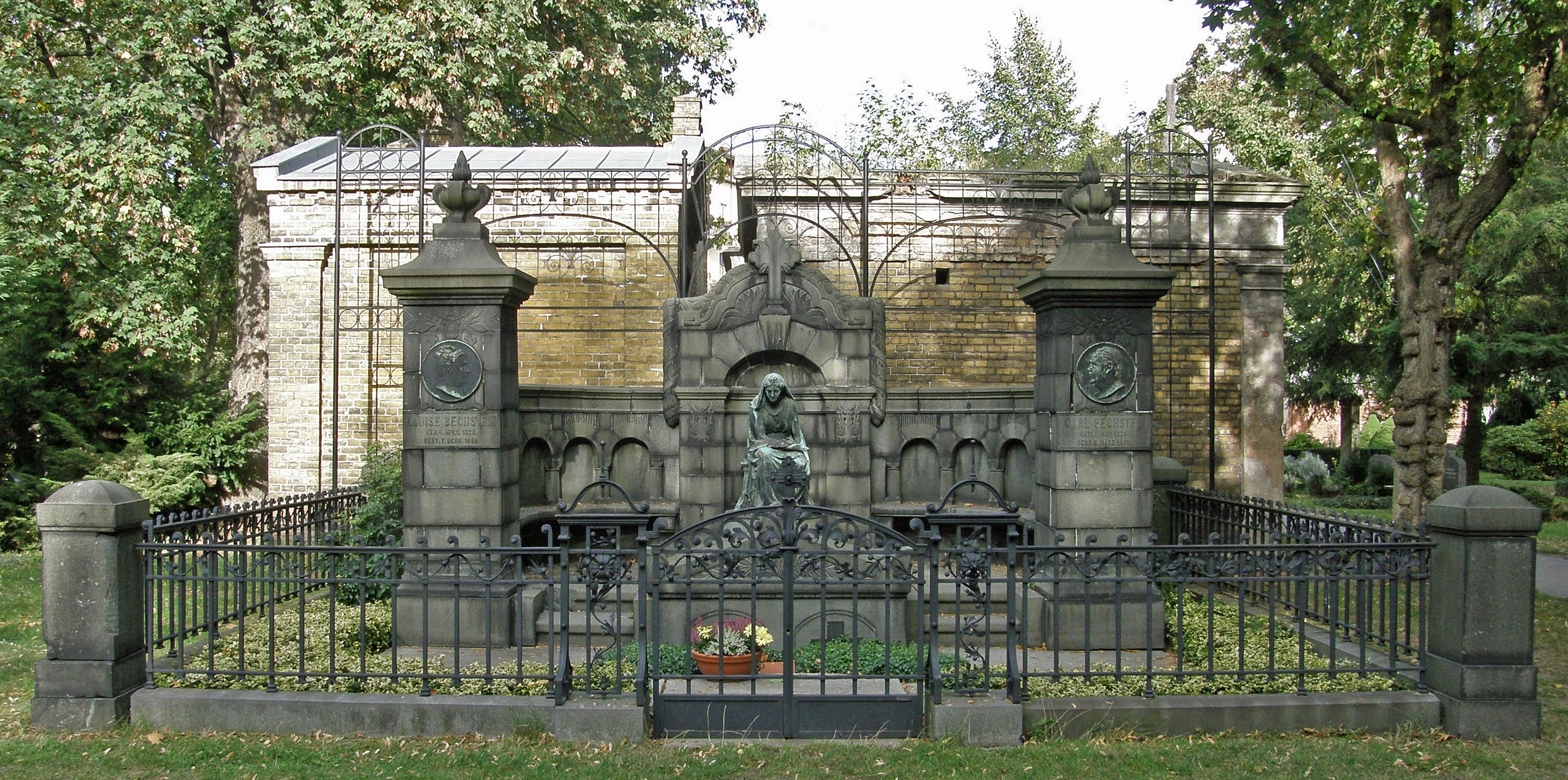 Grab von Carl Bechstein auf dem Sophien-Friedhof II in Berlin-Mitte.